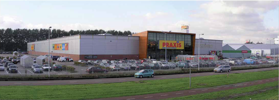 Praxis Amsterdam Zuid-Oost.